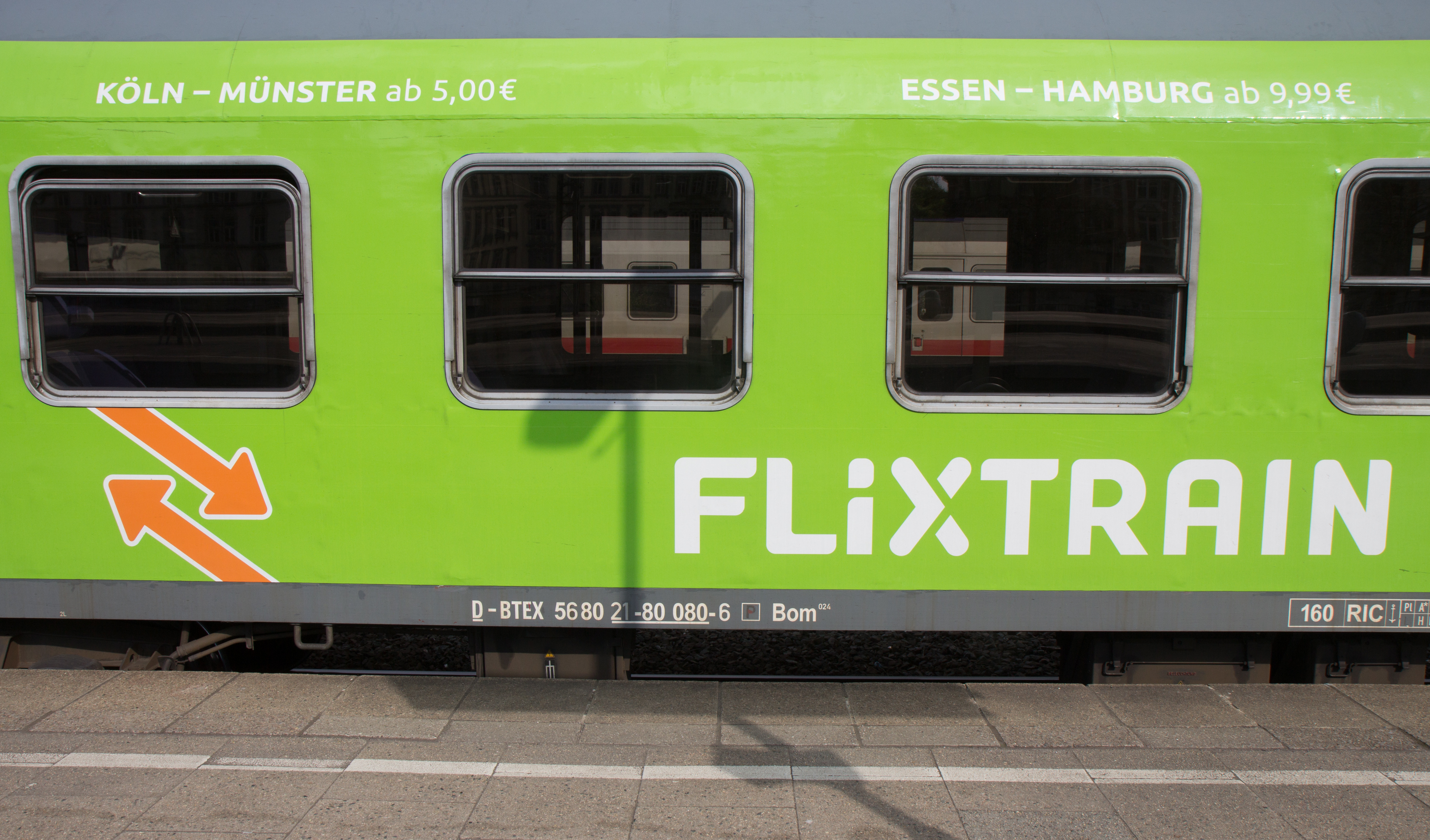 Flixtrain der Flixmobility im Bahnhof Hamburg Altona und auf der Fahrt bis Hamburg Haptbahnhof. Fotoarbeiten mit Akkreditierung der Pressestelle.